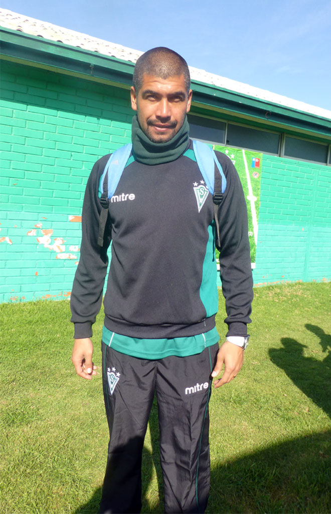 Fotografia de Jorge Ormeño, jugador chileno profesional de futbol que actualmente juega por el Santiago Wanderers de Chile.